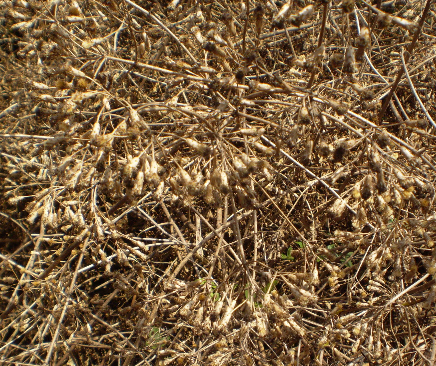 Bớp bớp khô Dried chromolaena odorata